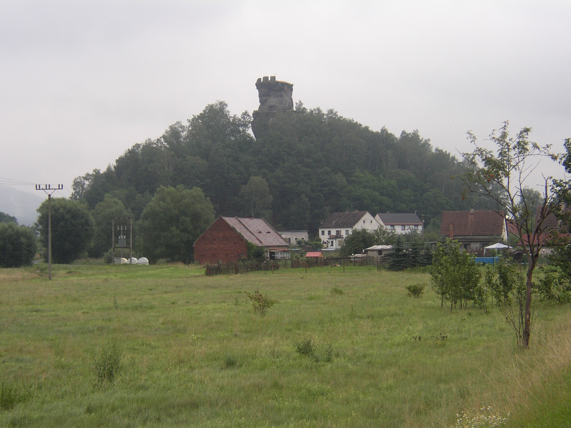 Hrad Jestřebí